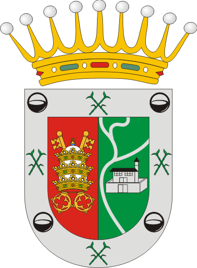 Escudo de Hermigua (Santa Cruz de Tenerife, España)